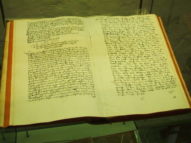 Das Foto zeigt Exponate im Kulturhistorischen Mseum in Stralsund in Stralsund im März 2007.